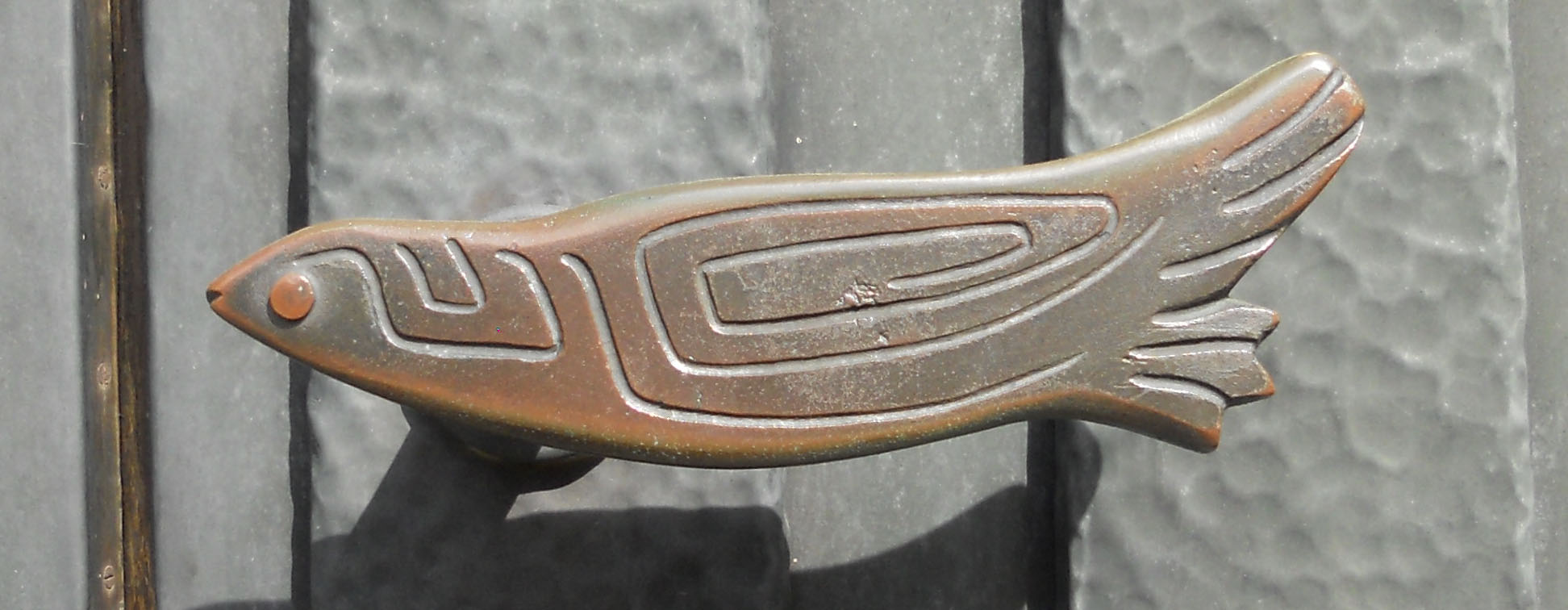 Werl, Sankt Norbertkirche, Handgriff von Joseph Wäscher 1